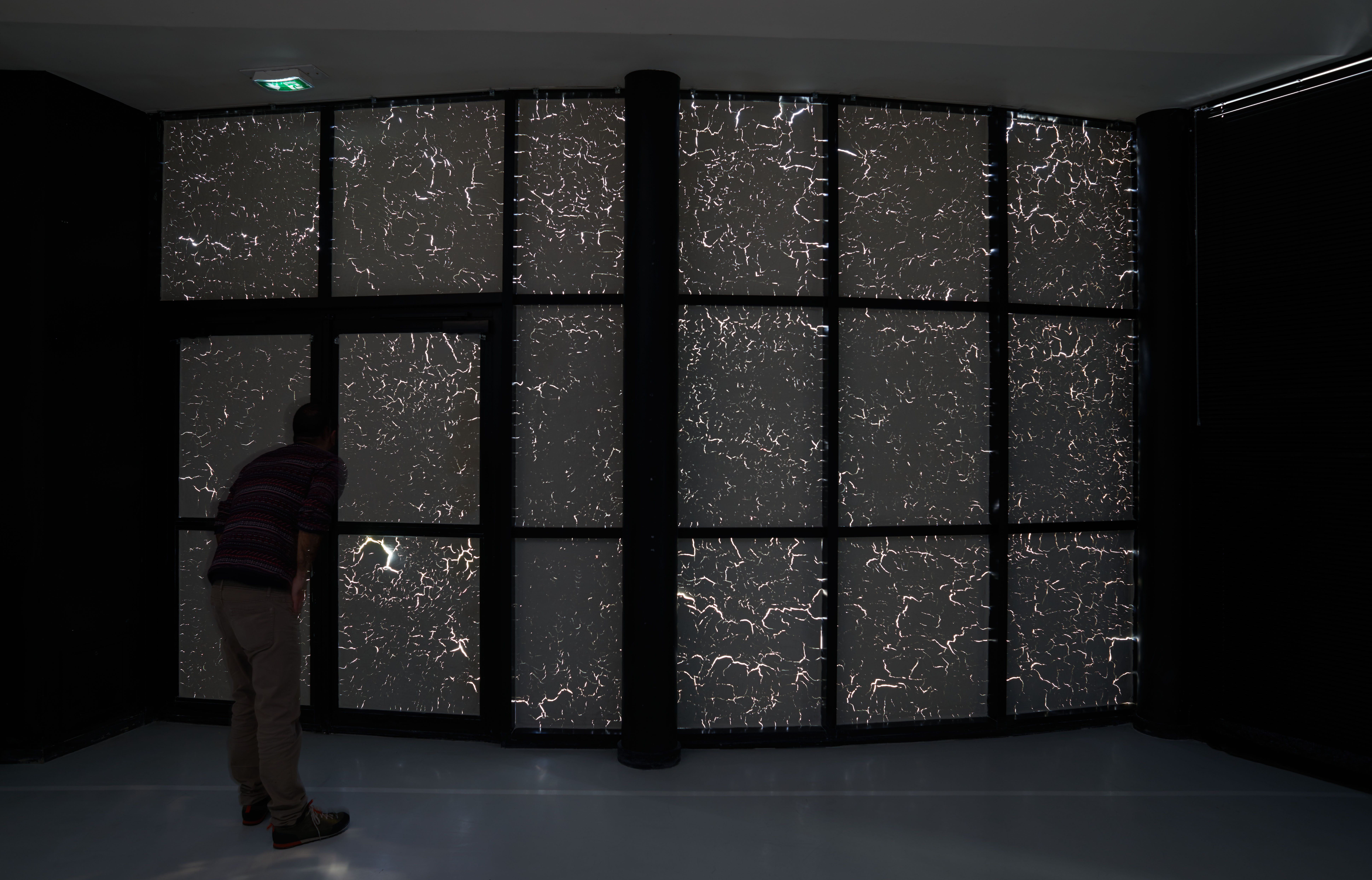 Abri _ Fabien Leaustic